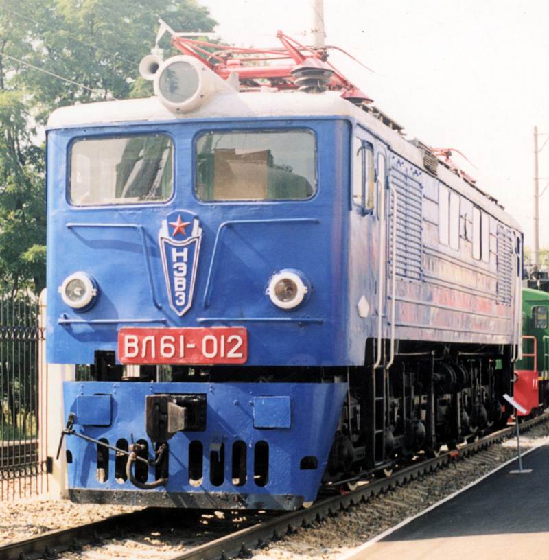 Электровоз ВЛ61-012 в музее Ростов-на-Дону